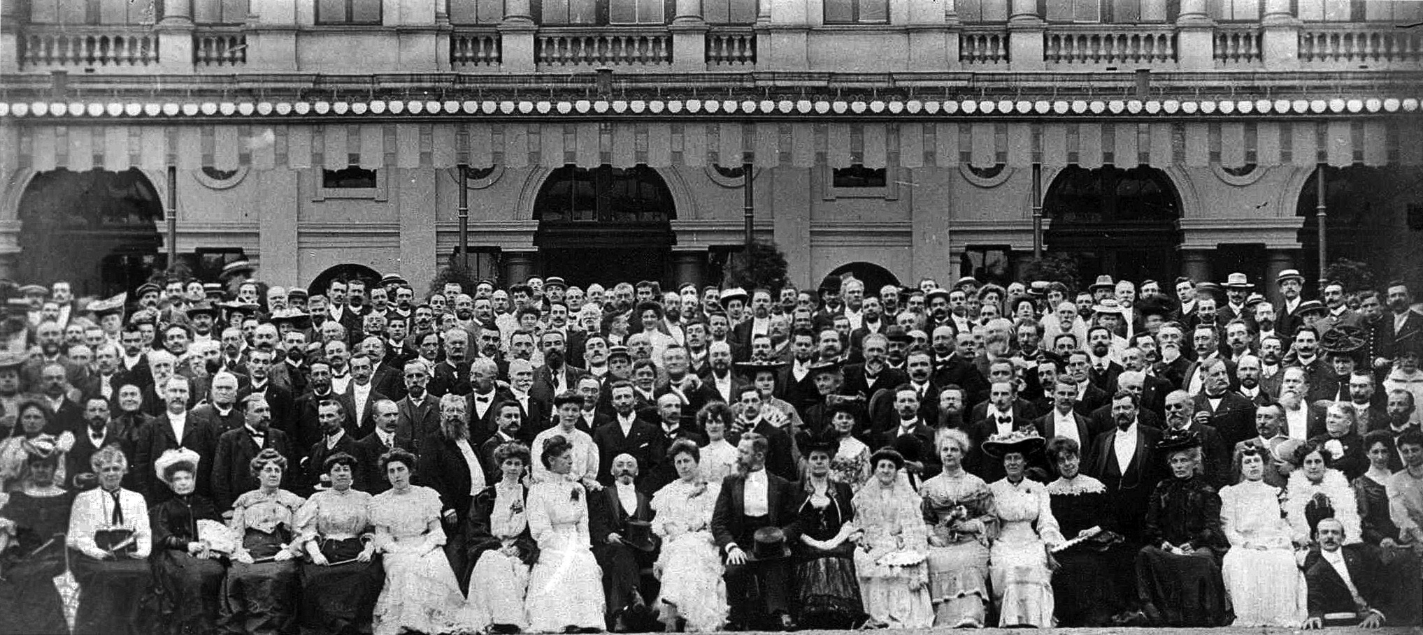 unua Universala Kongreso de Esperanto en Bulonjo (Francujo)